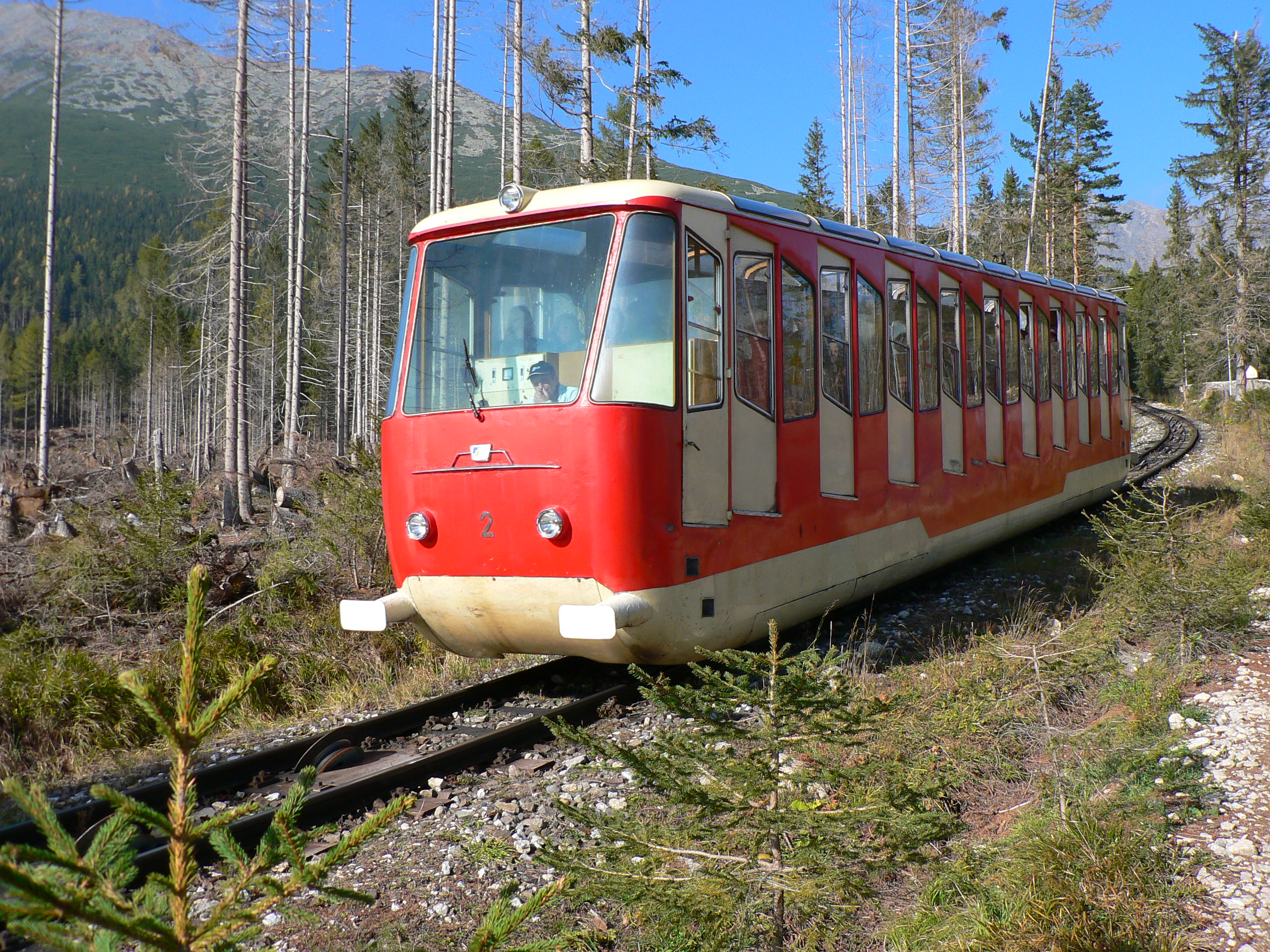 Modernešia pozemná lanovka zo začiatku 21.storočia